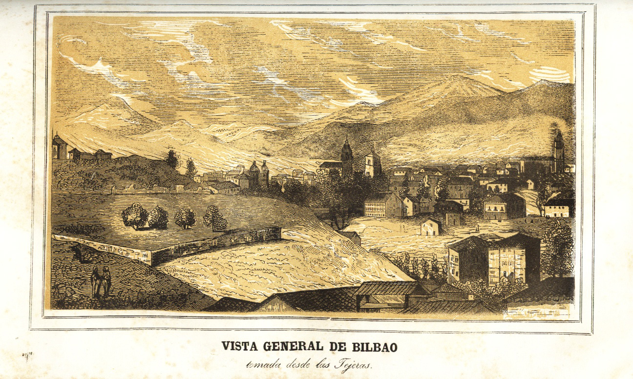 Vista general de Bilbao desde Las Tejeras. "Galería Militar Contemporánea". Madrid 1846.